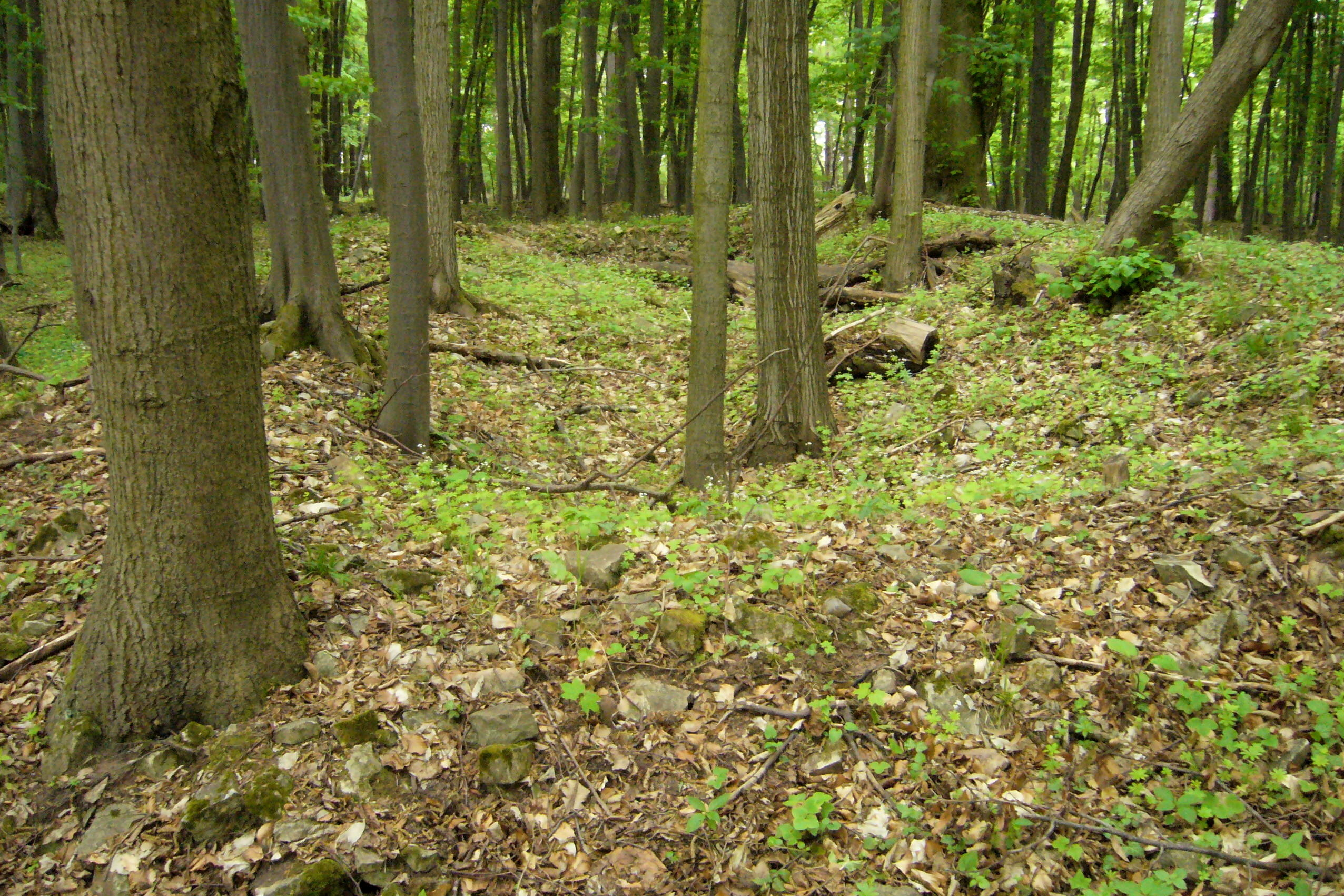 Terénní relikt budovy